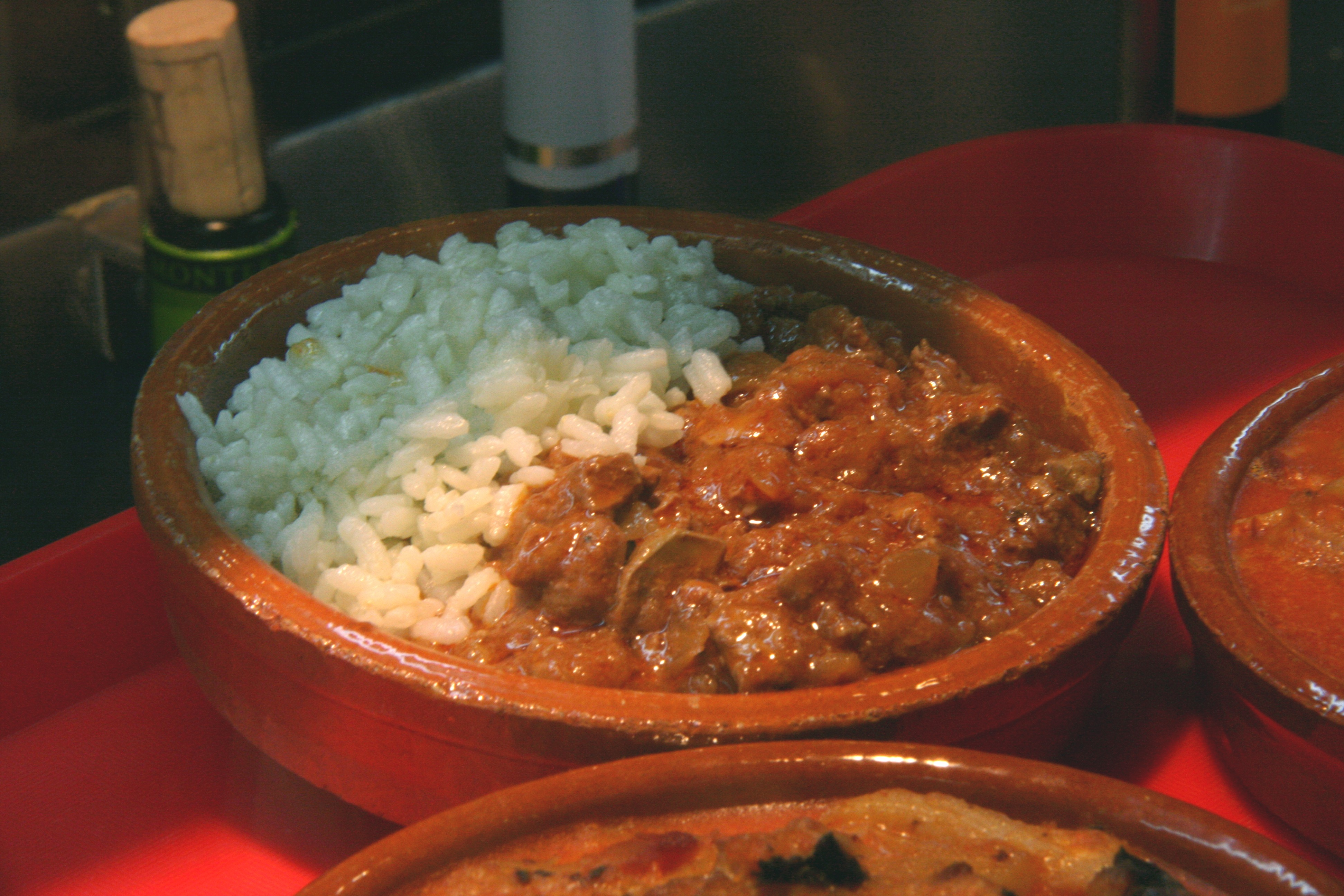 Arroz con riñones (Lhardy) - Barqueta de riñones